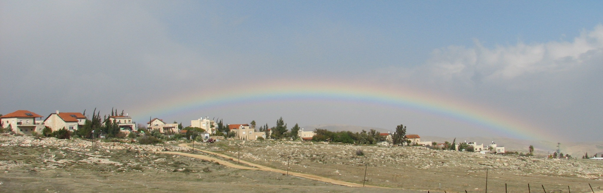 קשת בענן מעל ישוב ענתות - צולם בשנת 2007